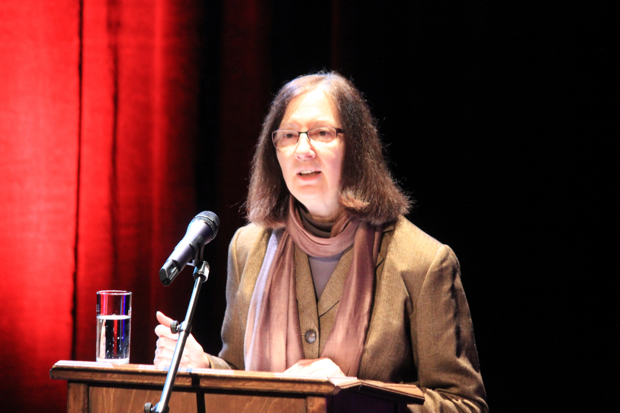 Hornjoserbsce: Serbska basnica Róža Domašcyna w měrcu 2018.